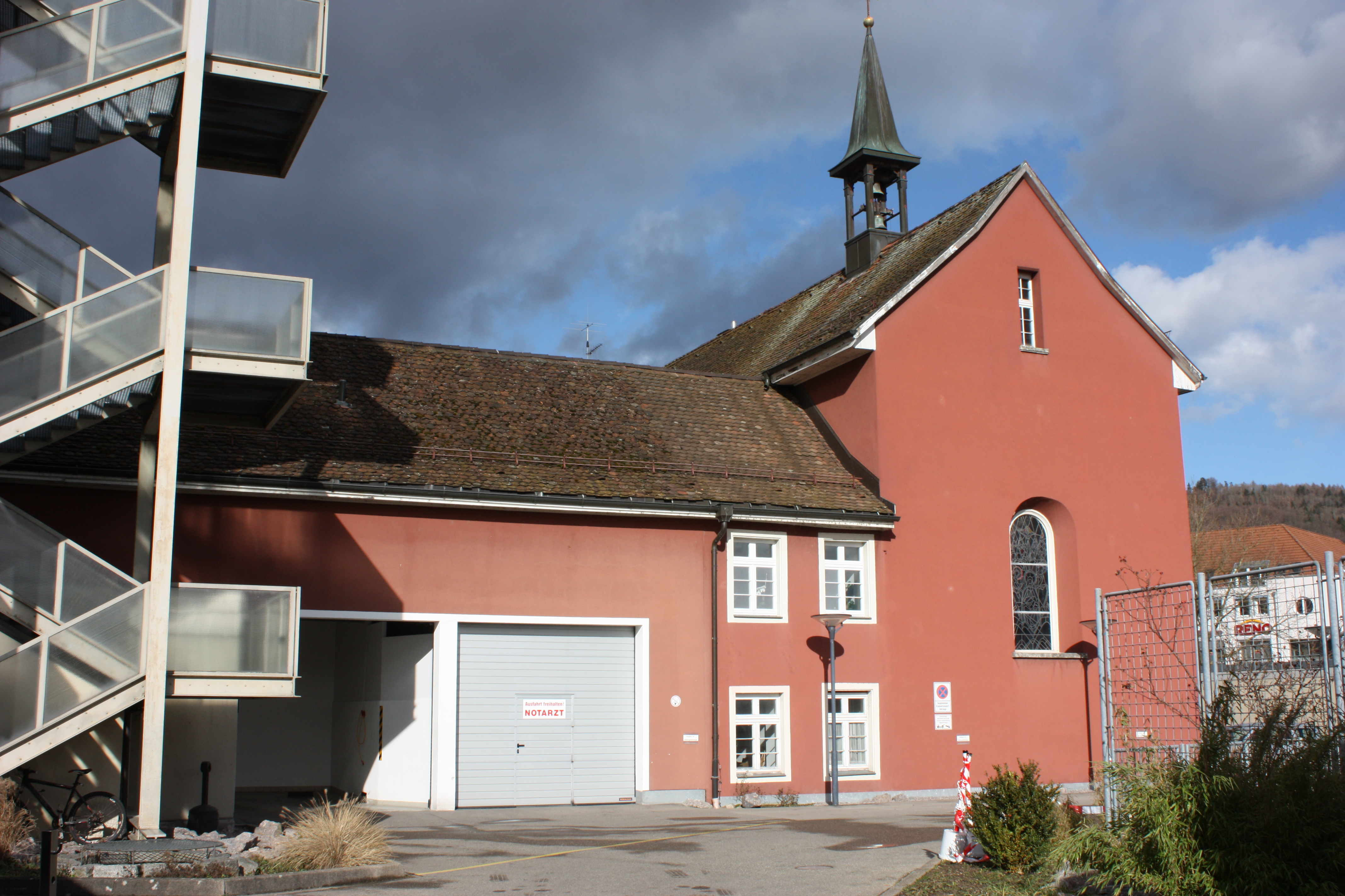 Südseite des ehemaligen Kapuzinerklosters Waldshut.